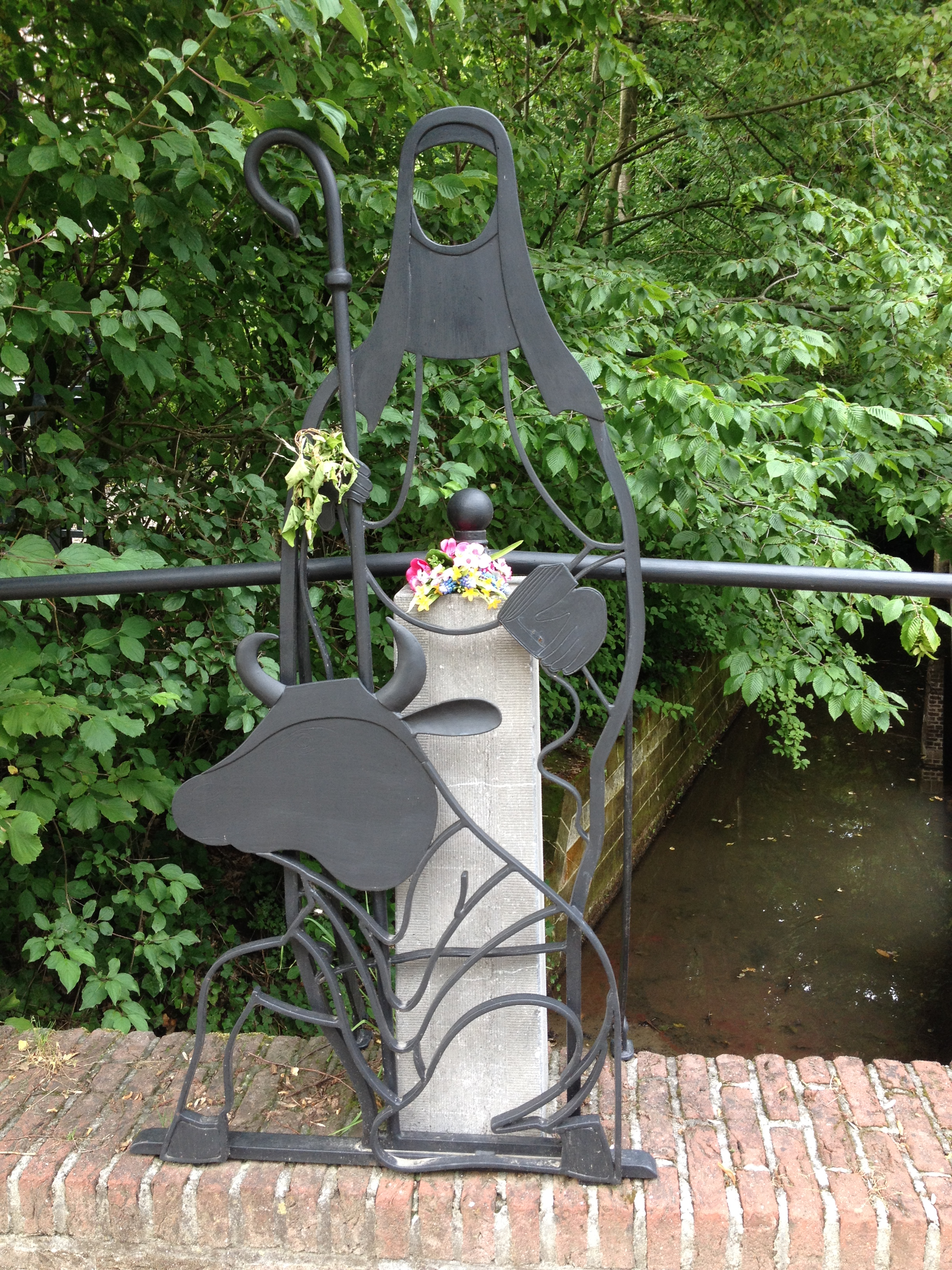 Kunstwerk van Sint Brigida met vee door Math Wanders (2008) bij de Sint Brigidabron in de Wesch, Noorbeek.